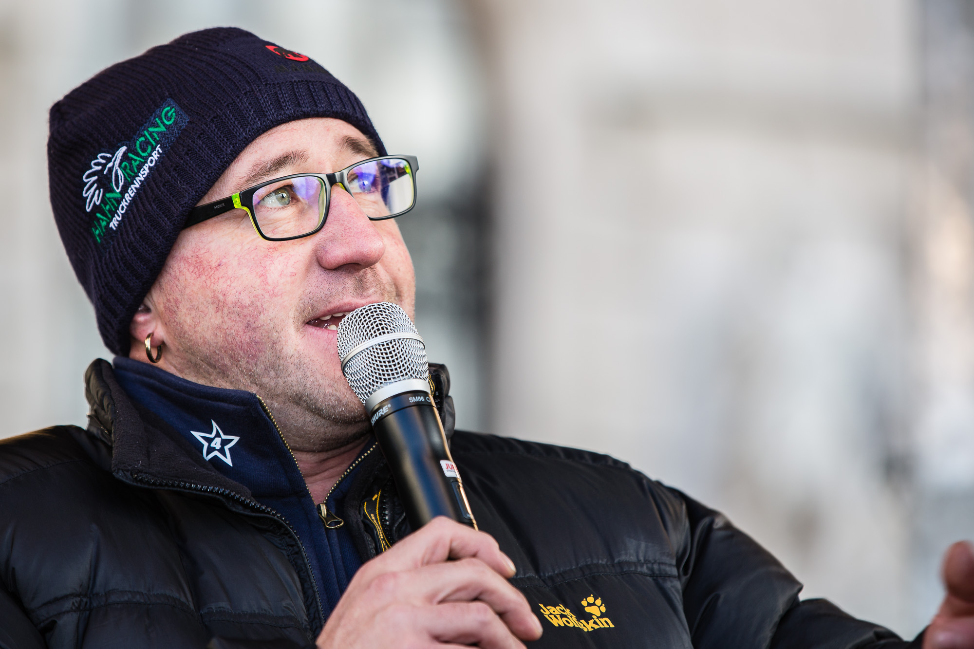 Jochen Hahn bei der Publikumsveranstaltung "ÖAMTC Welt des Motorsports" Begleitend zu FIA Gala in der Wiener Hofburg am Freitag, 2. Dezember am Wiener Heldenplatz